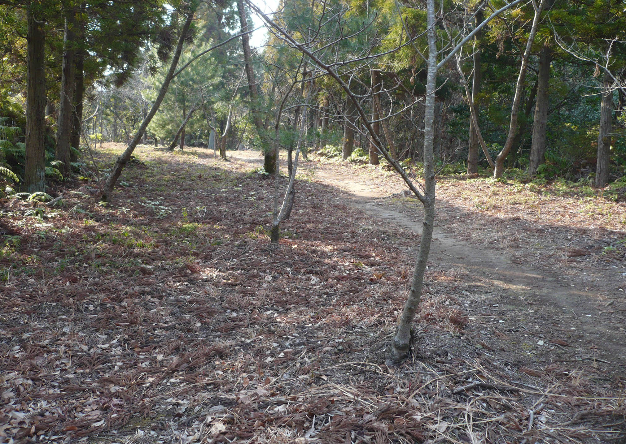 才蔵丸跡